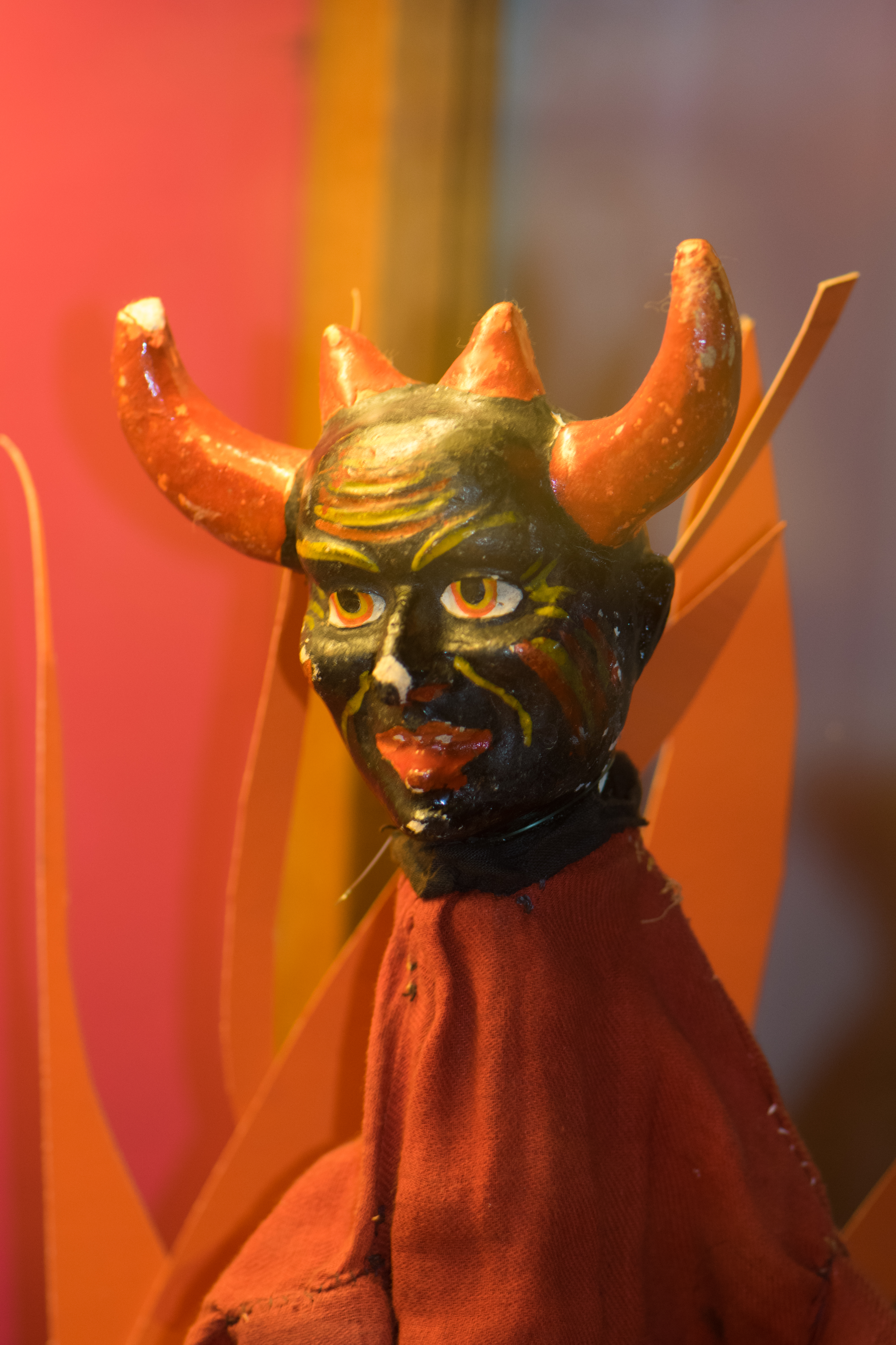 Le Musée du Jouet de Bruxelles